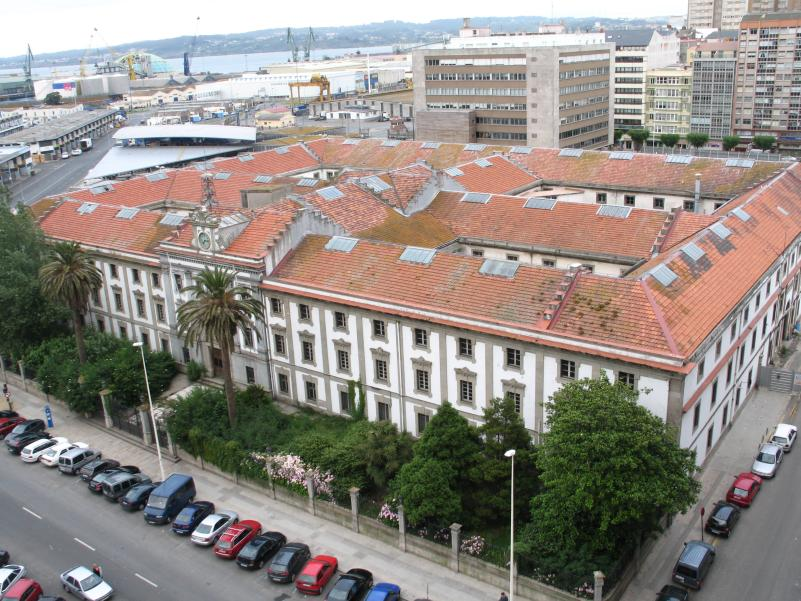 Fábrica de Tabacos